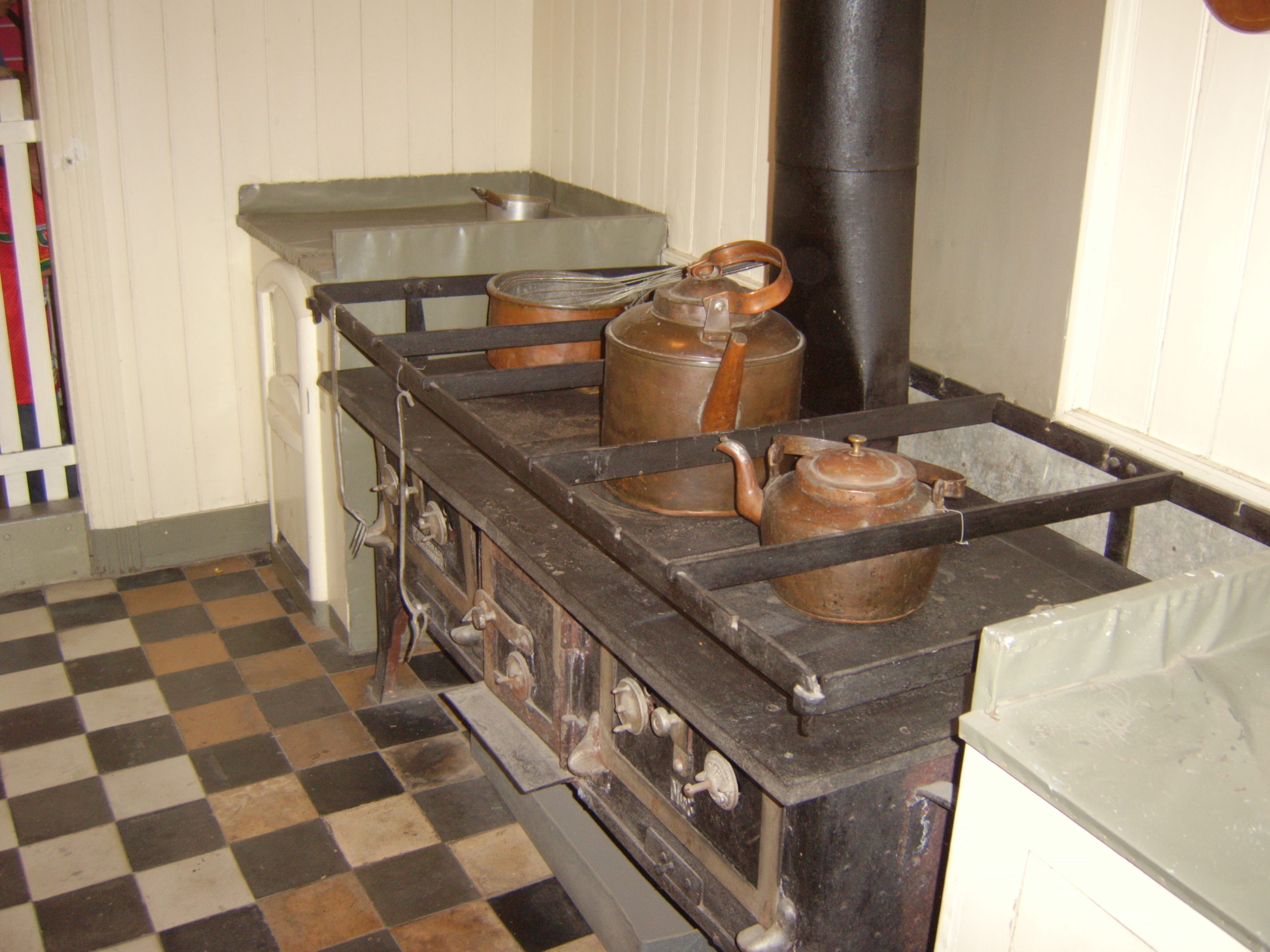 Fram museum, Frammuseum Oslo, Norway